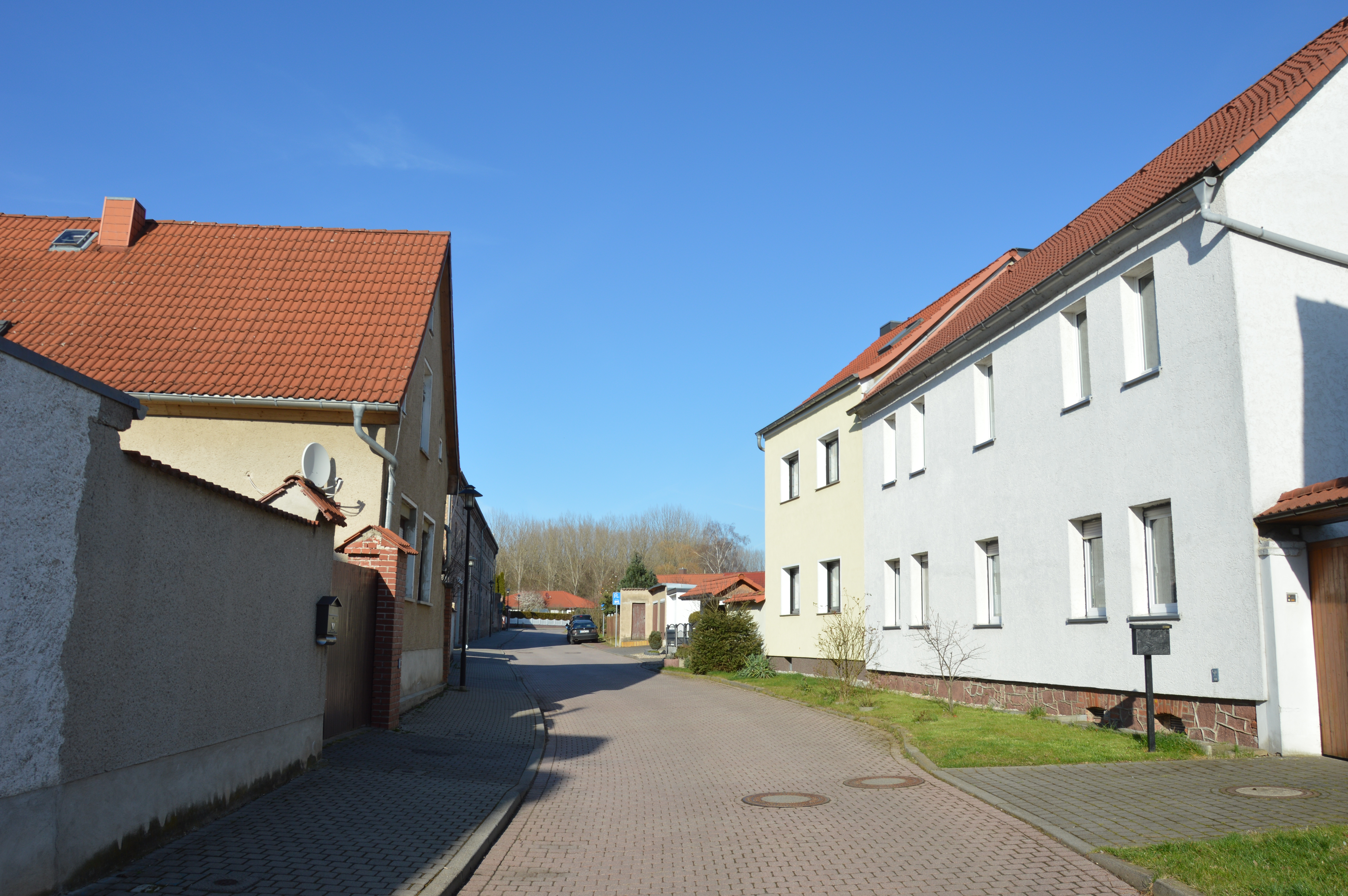 Straßenzug Döckritz